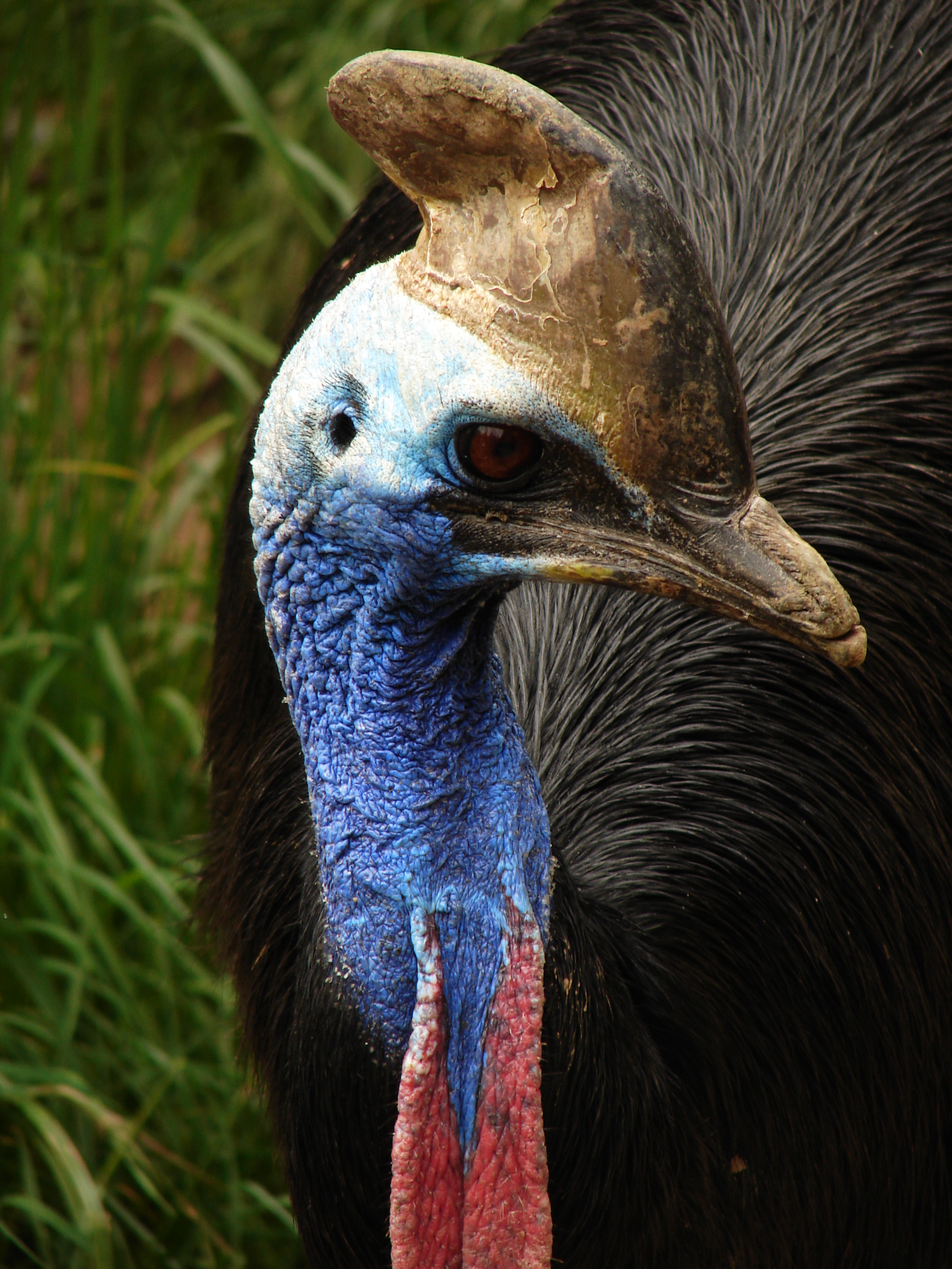 Cossowary Bogazici Zoo